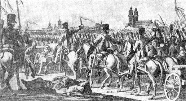 Aufmarsch zur Erstürmung der Lutherstadt Wittenberg am 12./13. Januar 1814